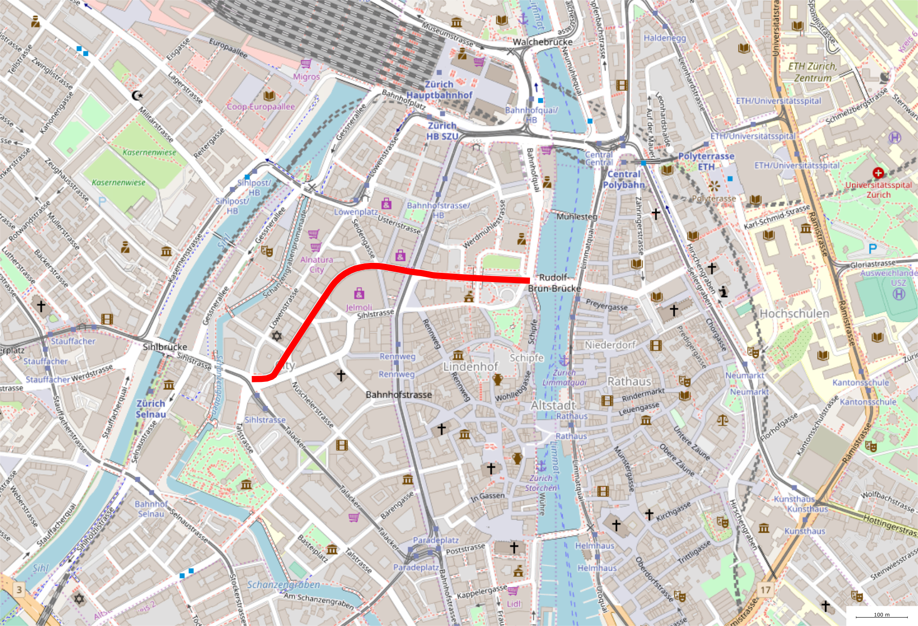 Karte der Zürcher Altstadt mit rot eingezeichneter Uraniastrasse